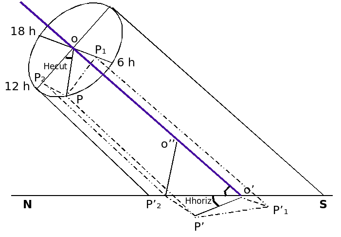 RPLl2006